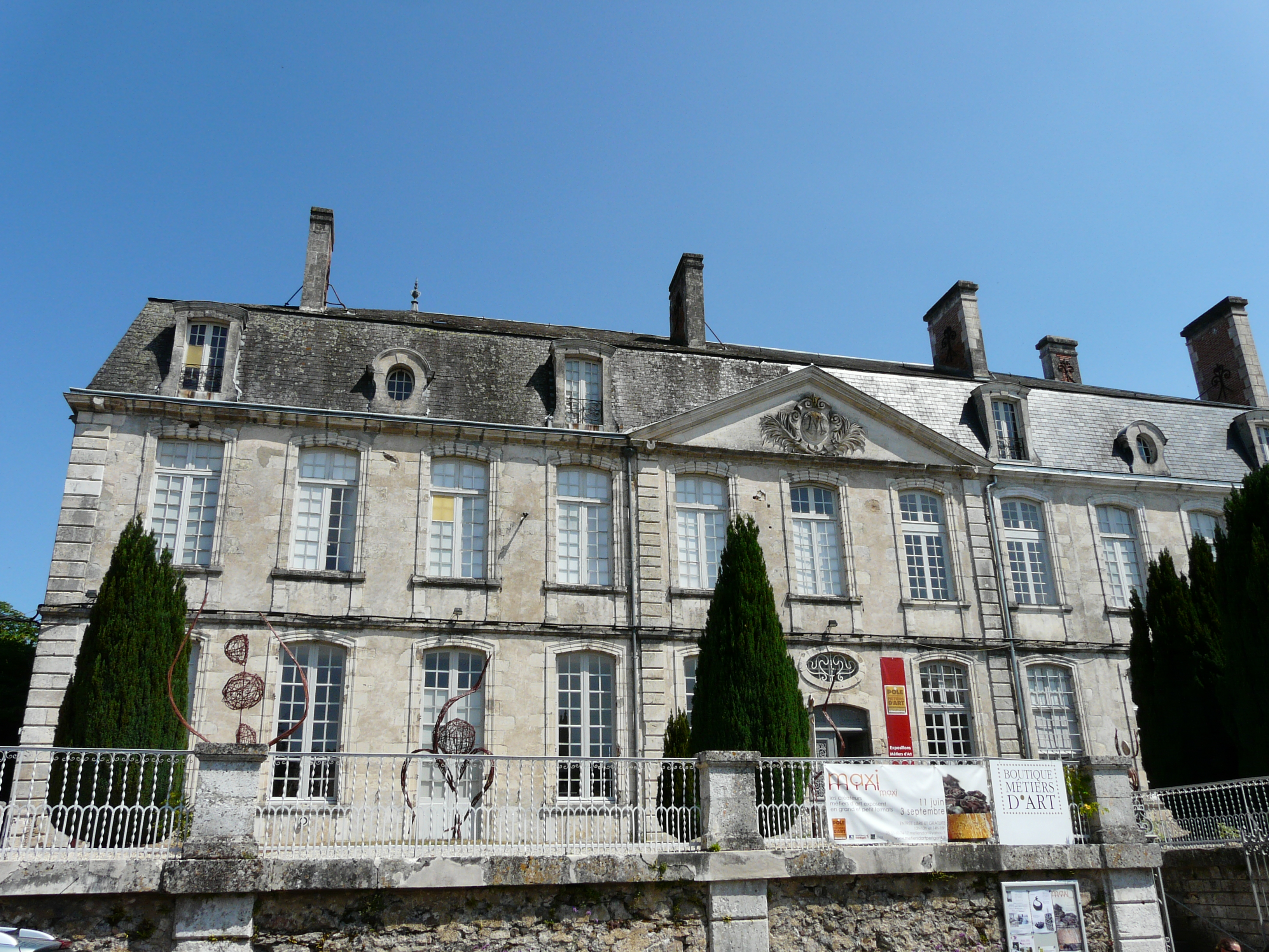 La façade ouest du château de Nontron, Dordogne, France.